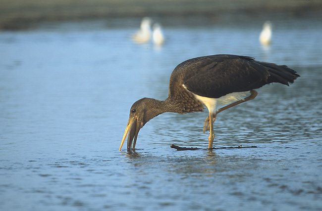 Ciconia nigra